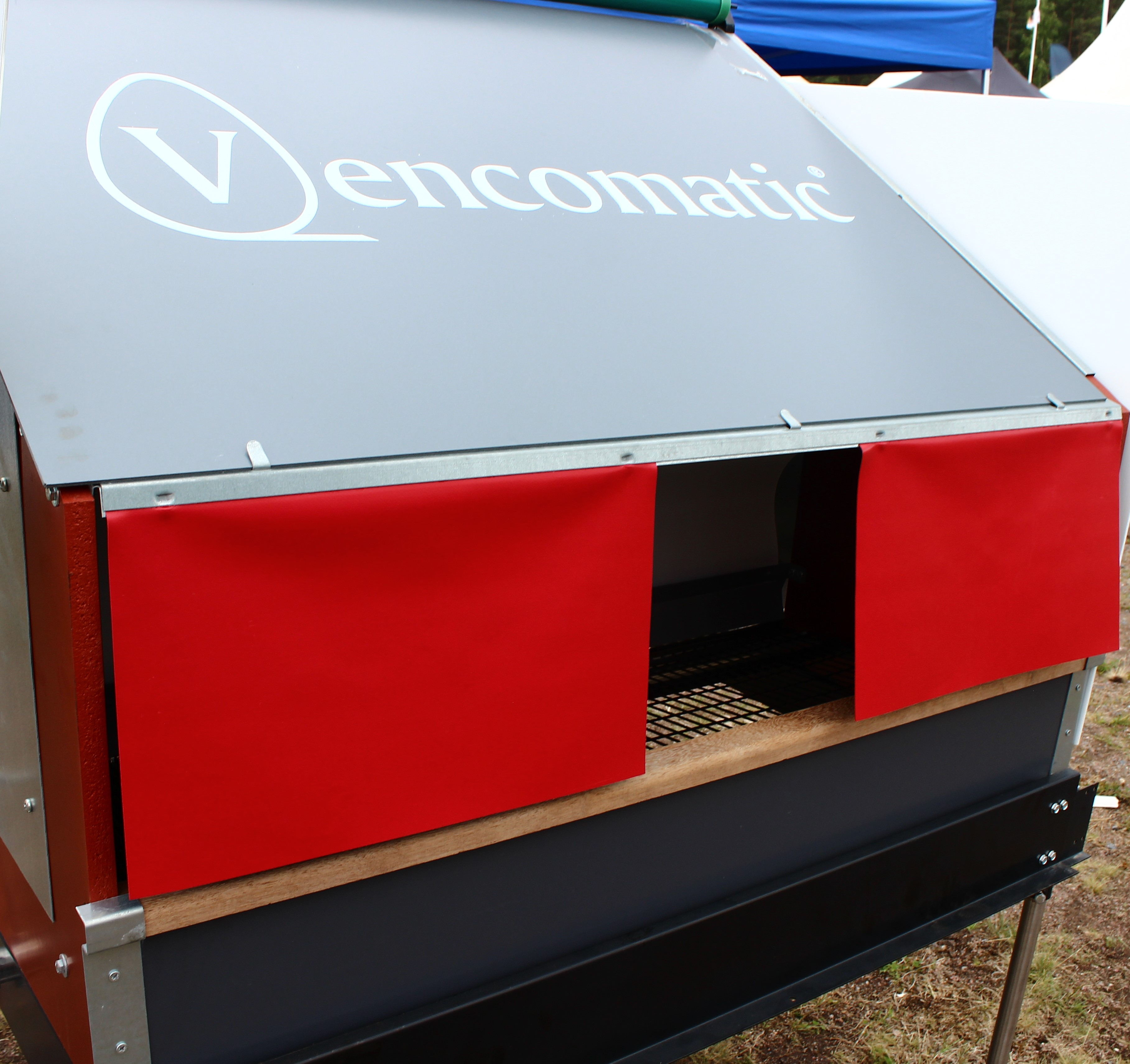 A classic free-range chicken nest, Okra farm fairs in Finland